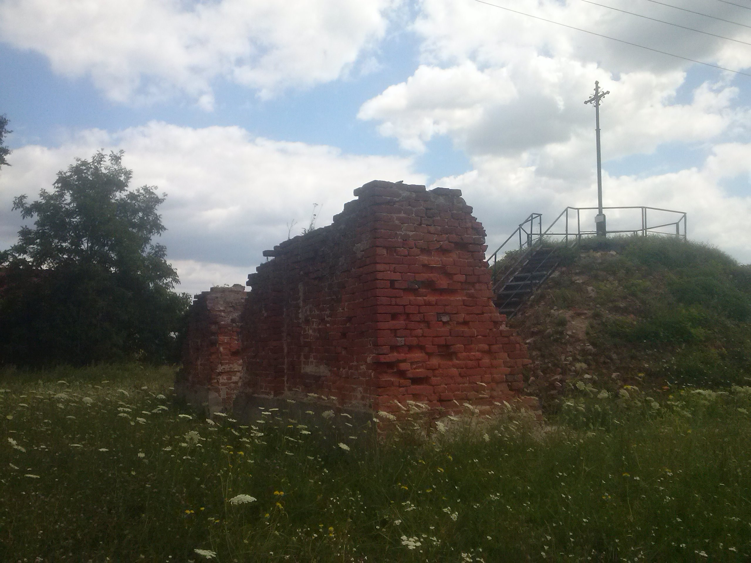 Ruiny cerkwi pw. św. Jana Ewangelisty w Piskorowicach - resztki murów, a dalej widoczny kopiec pamięci usypany z cegieł cerkiewnych, z krzyżem z kopuły cerkwi